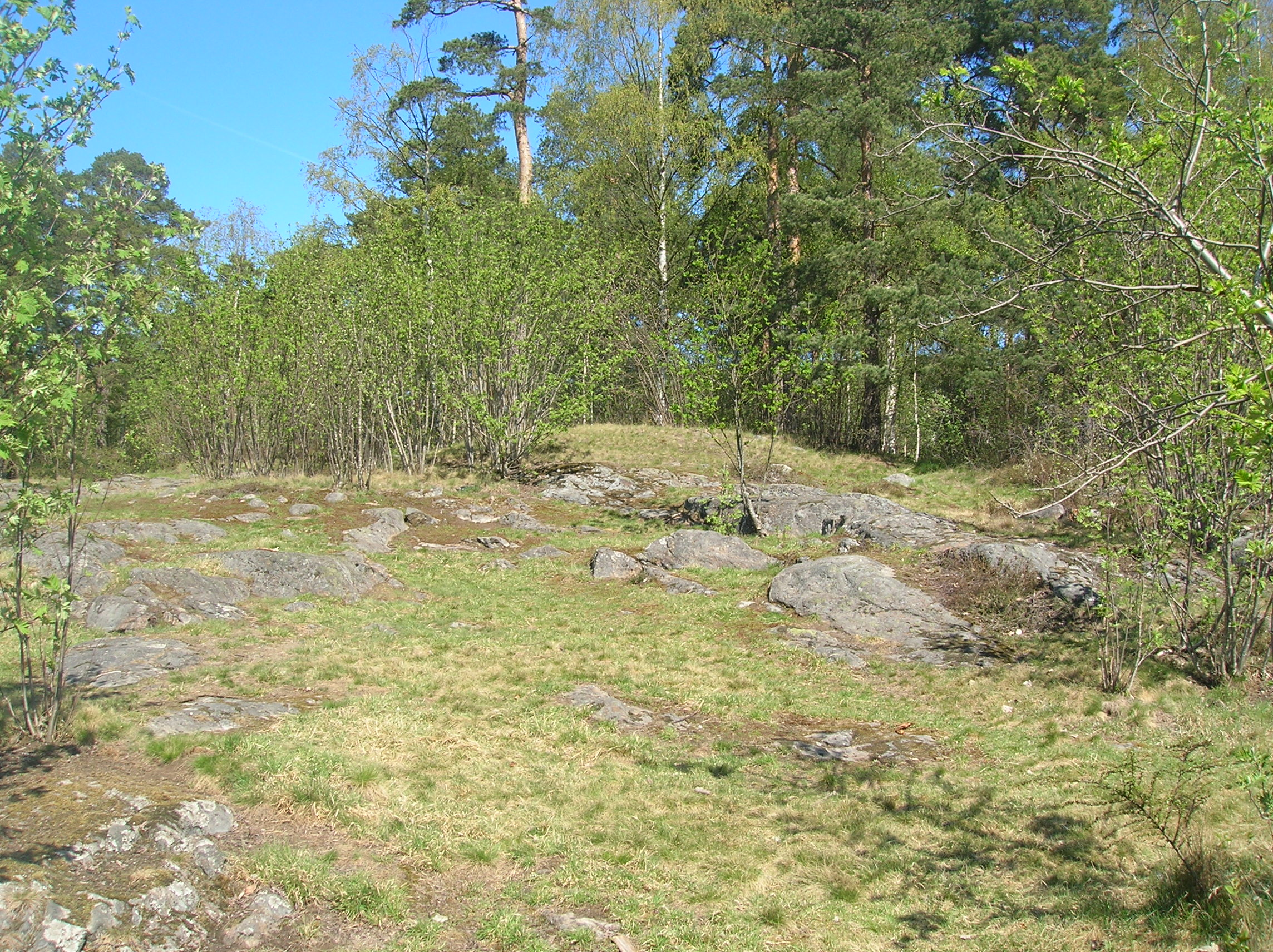 Gravfält RAÄ77 vid Kyrkparken i Årsta, Stockholms kommun. Totalt 45 fornlämningar, varav 10 högar, 33 runda stensättningar och 2 skeppsformiga stensättningar. Troligtvis från folkvandringstid el.vikingatid